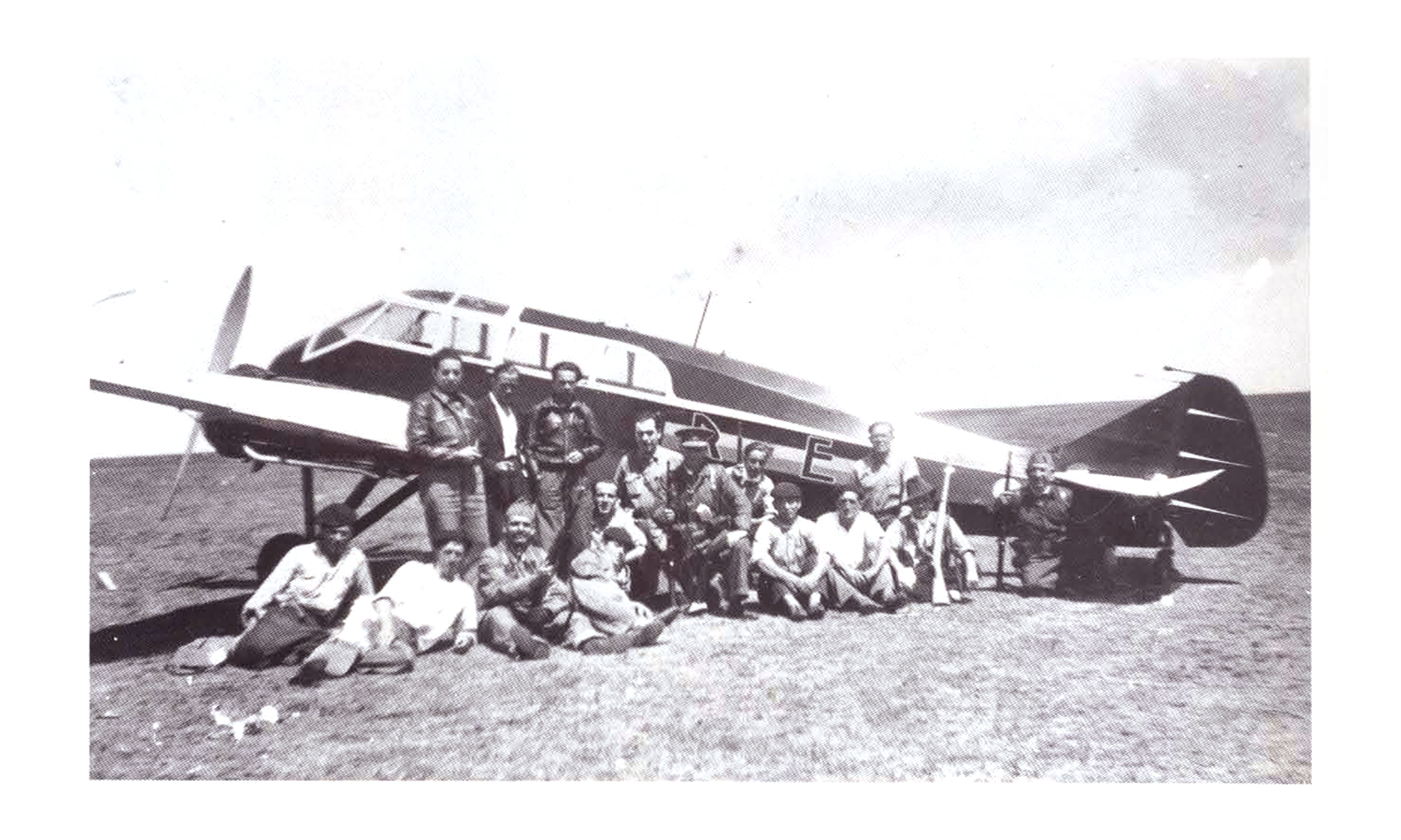 General Aircraft ST-25 Jubilee (Monospar) - Avion pilotado por Eloy Fernández Navamuel